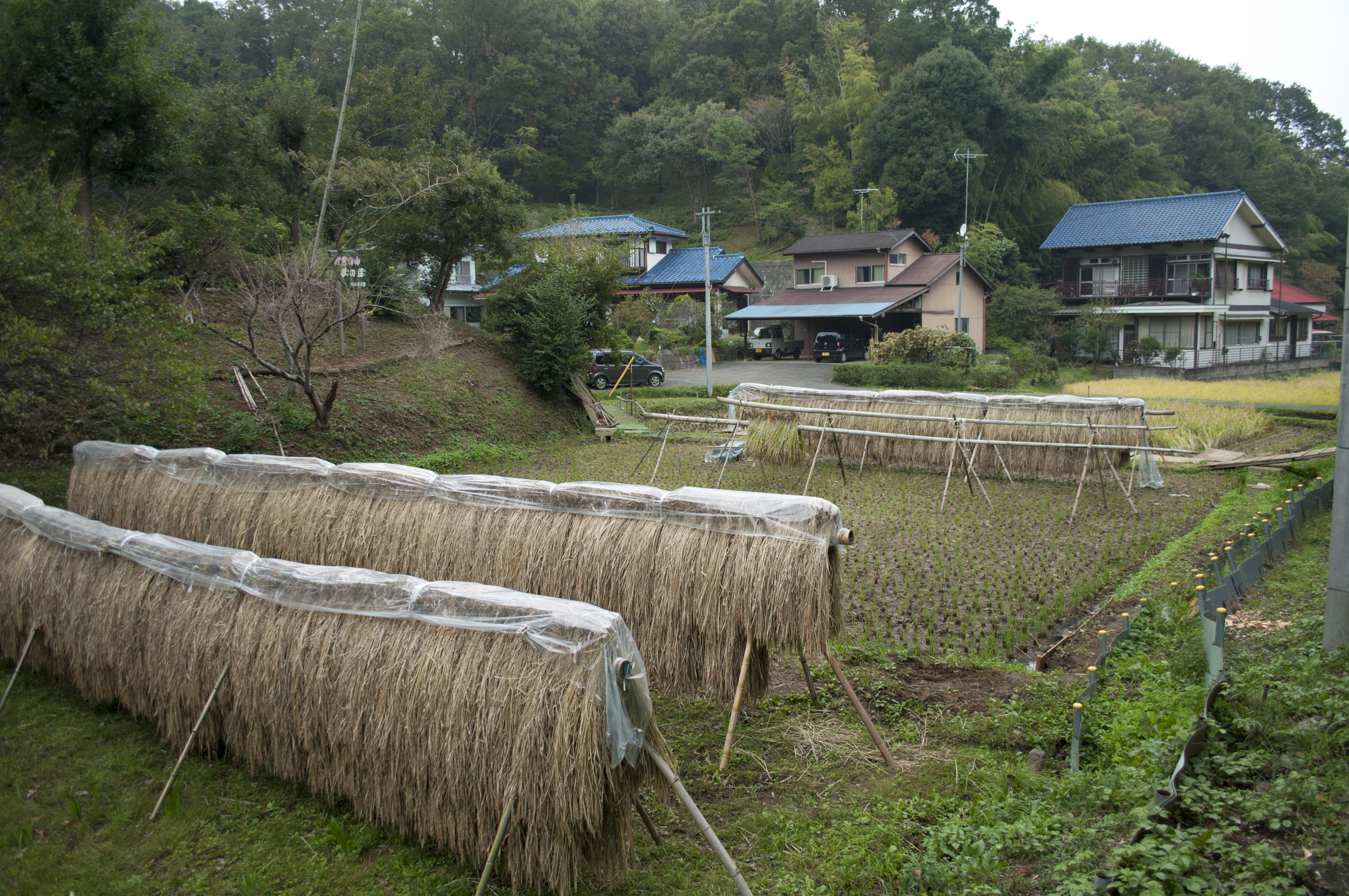 寺家ふるさと村